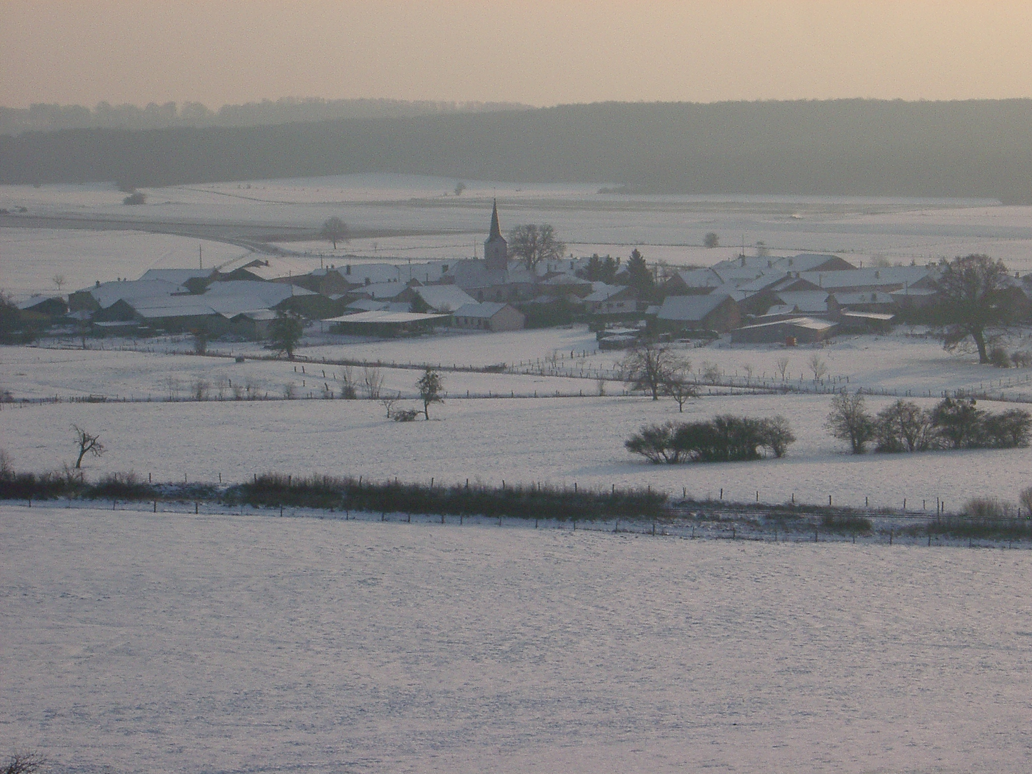 Vue générale du village d'Aulnois